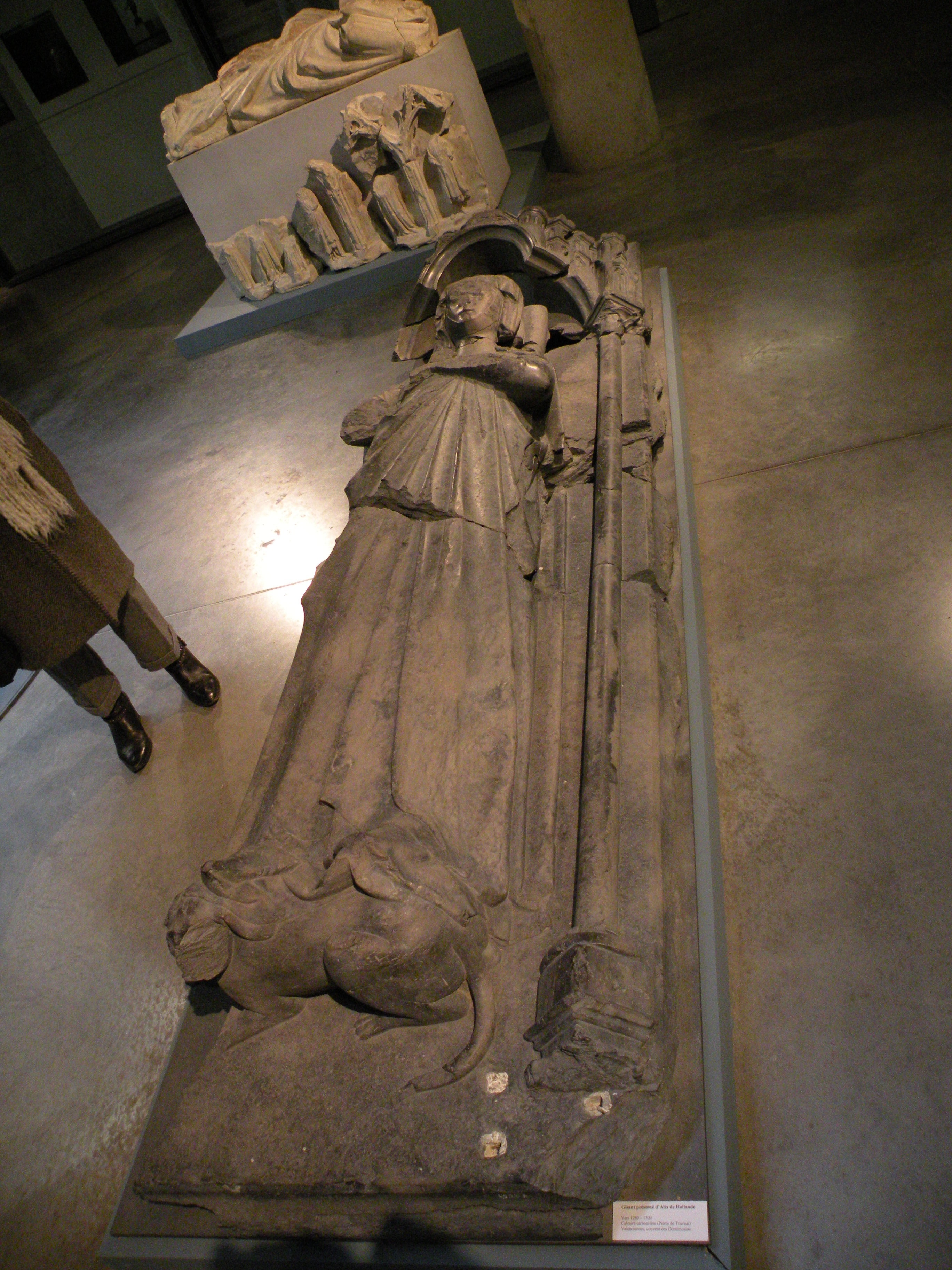 Gisant d’Alix de Hollande Atelier de Tournai Vers 1280-1300 Pierre de Tournai Long. 2,87 ; L. 0,72 Provenance : couvent des Dominicains